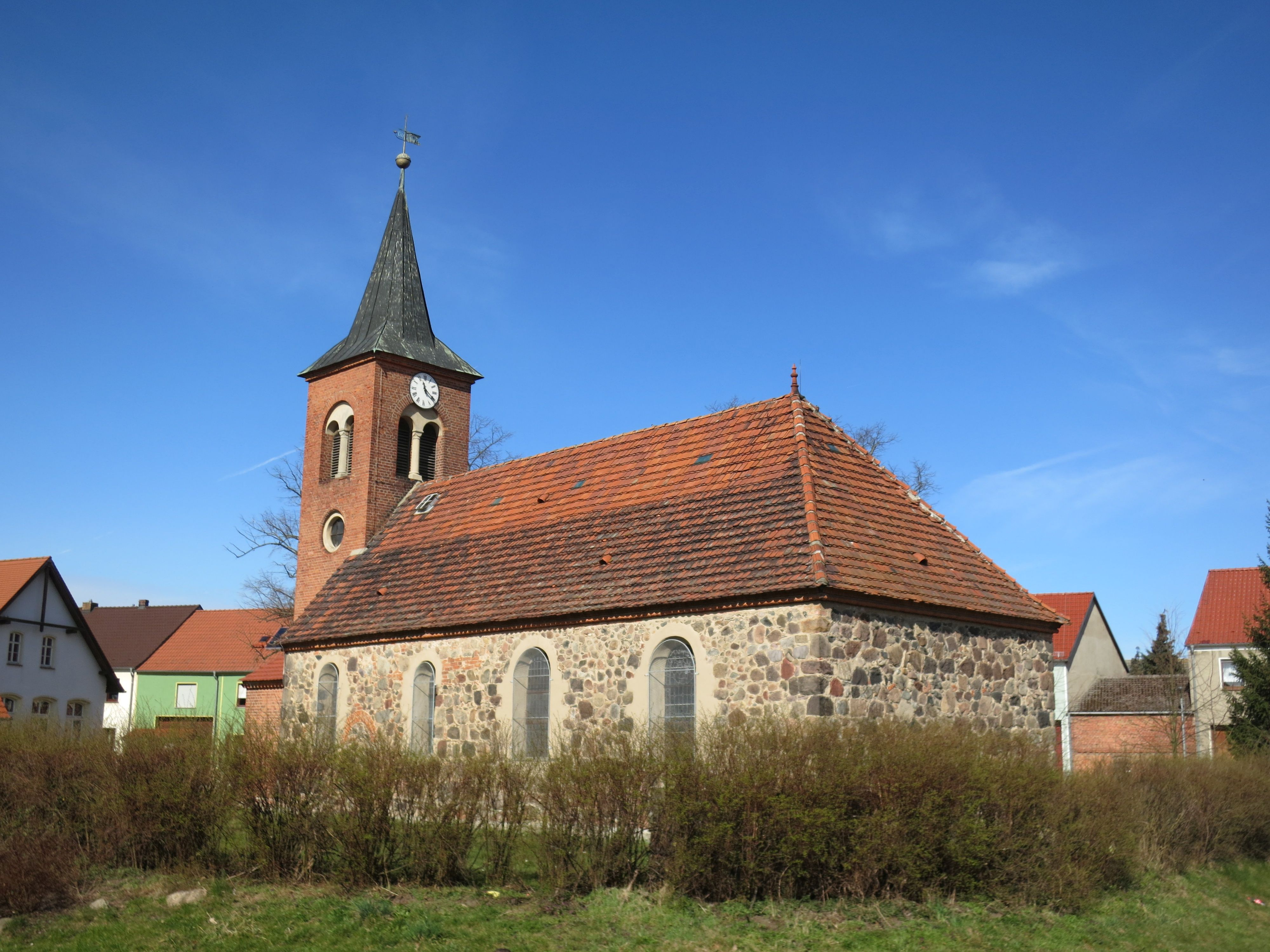 Kirche in Reppinchen, Blick von Südosten